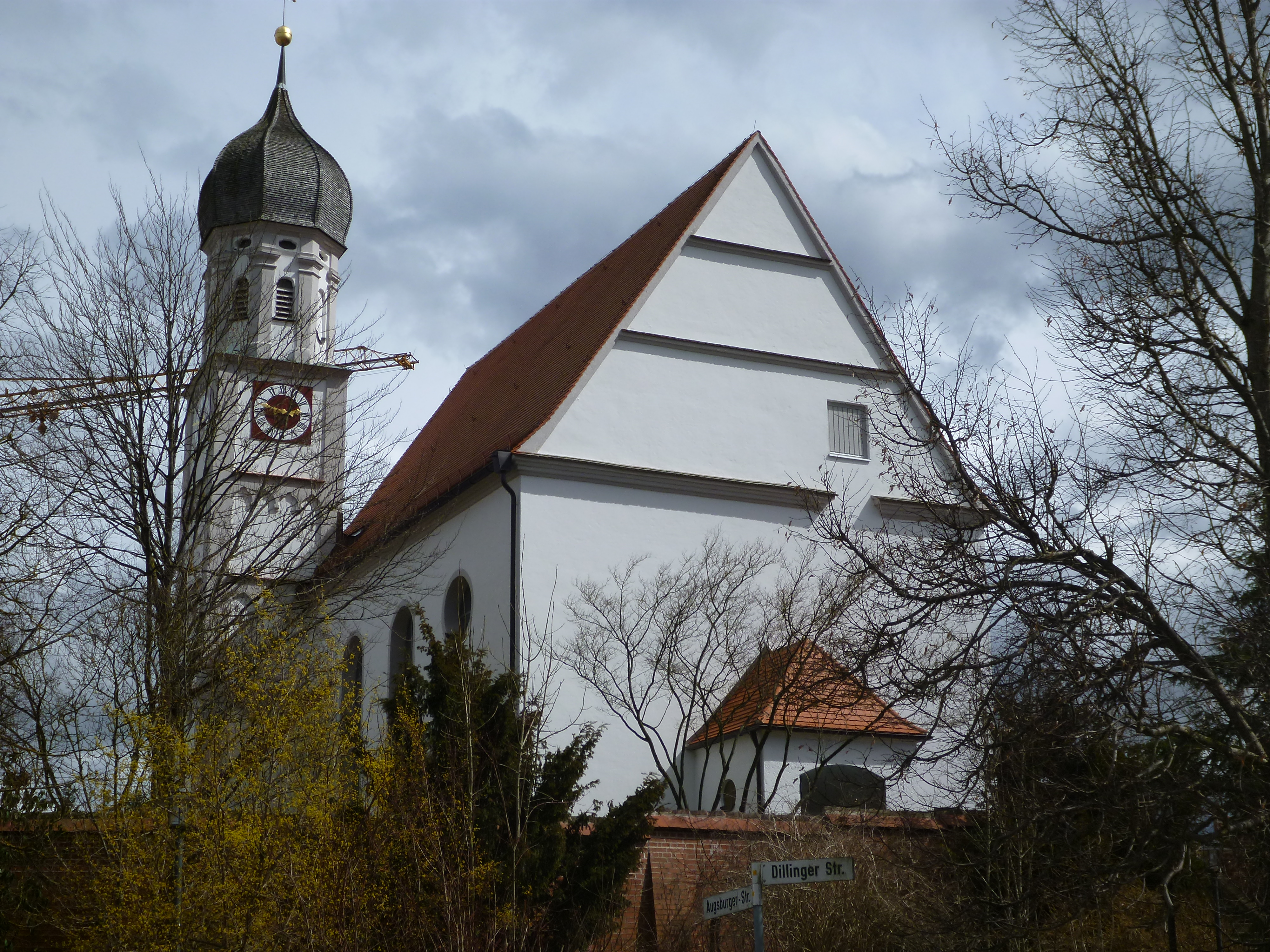 Außenansicht